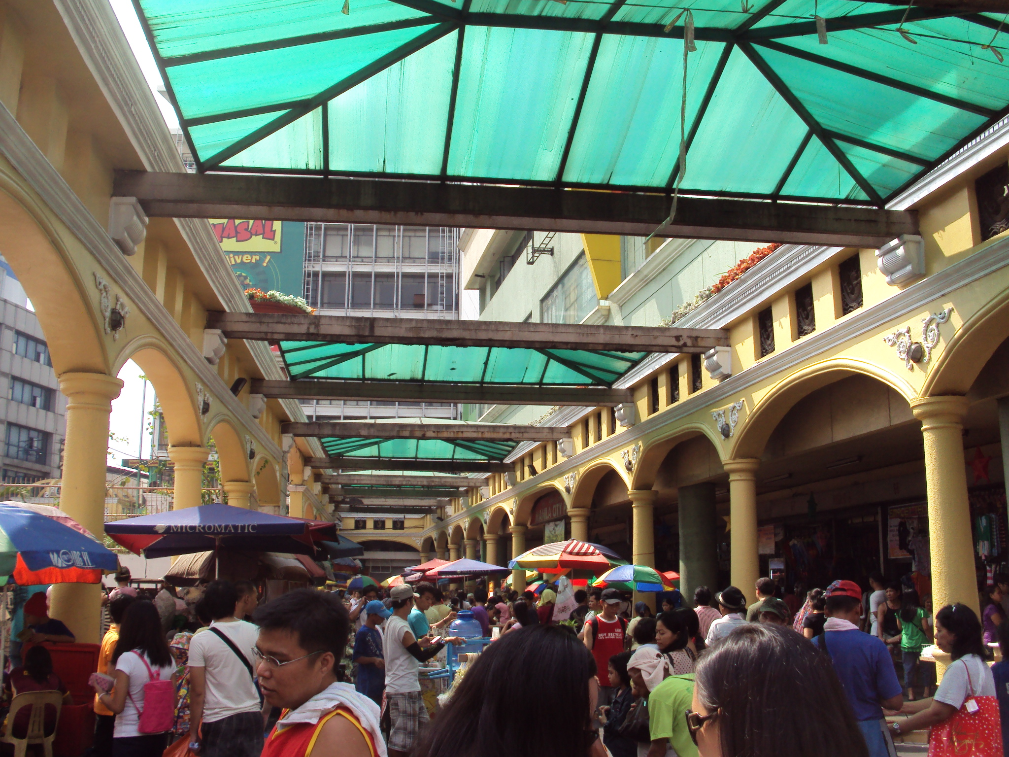 Plaza Miranda in Manila, Philippines